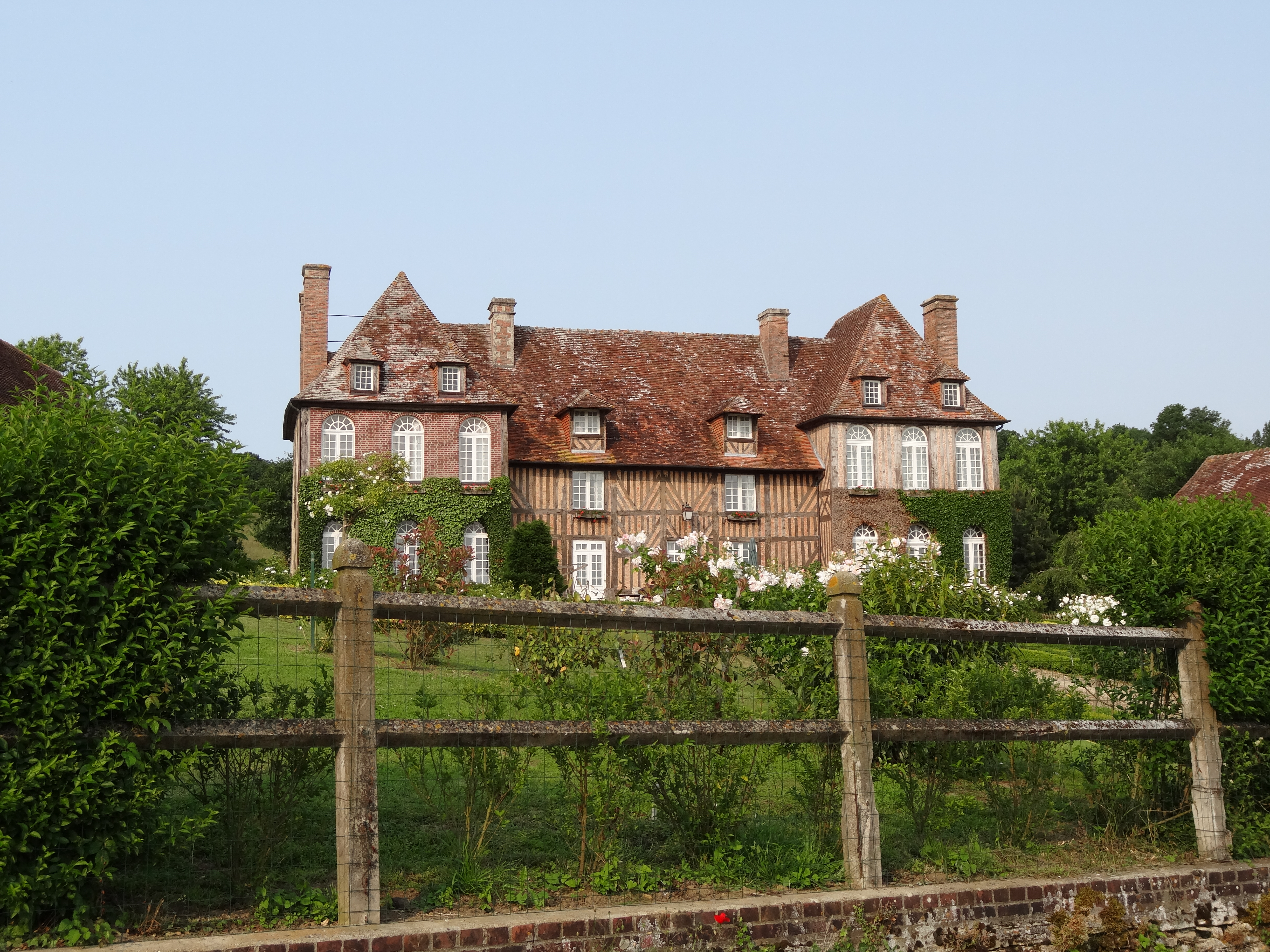 Logis du Manoir du Lieu-Rocher à Vieux-Pont-en-Auge